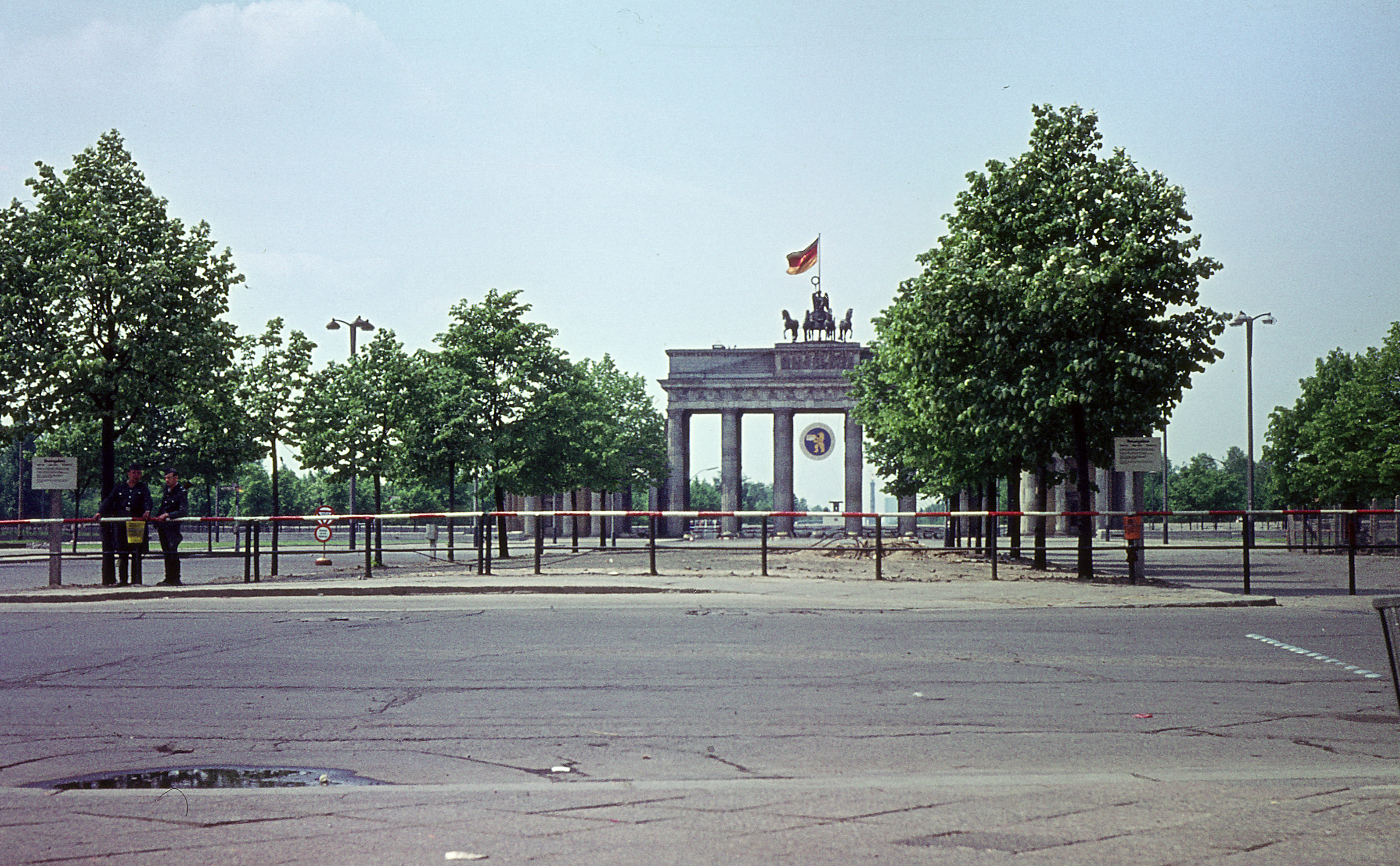 Pariser Platz and Brandenburger Tor (east side) in 1964, in Background the Siegessaeule in West Berlin